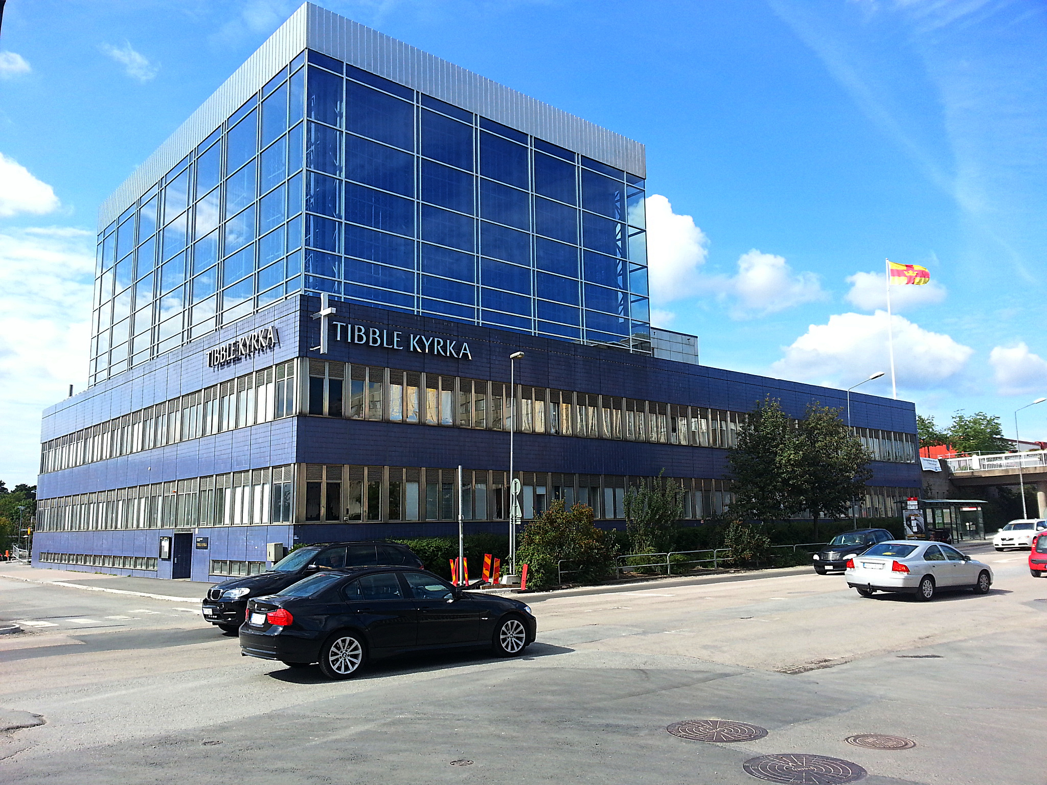 Tibble kyrka tagen med mobiltelefon